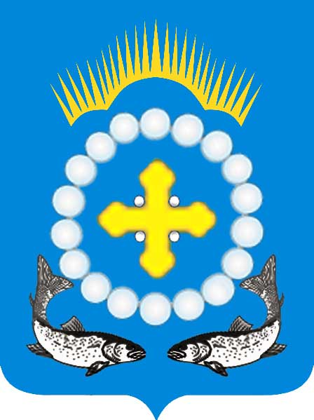 Герб Варзуги (проект)